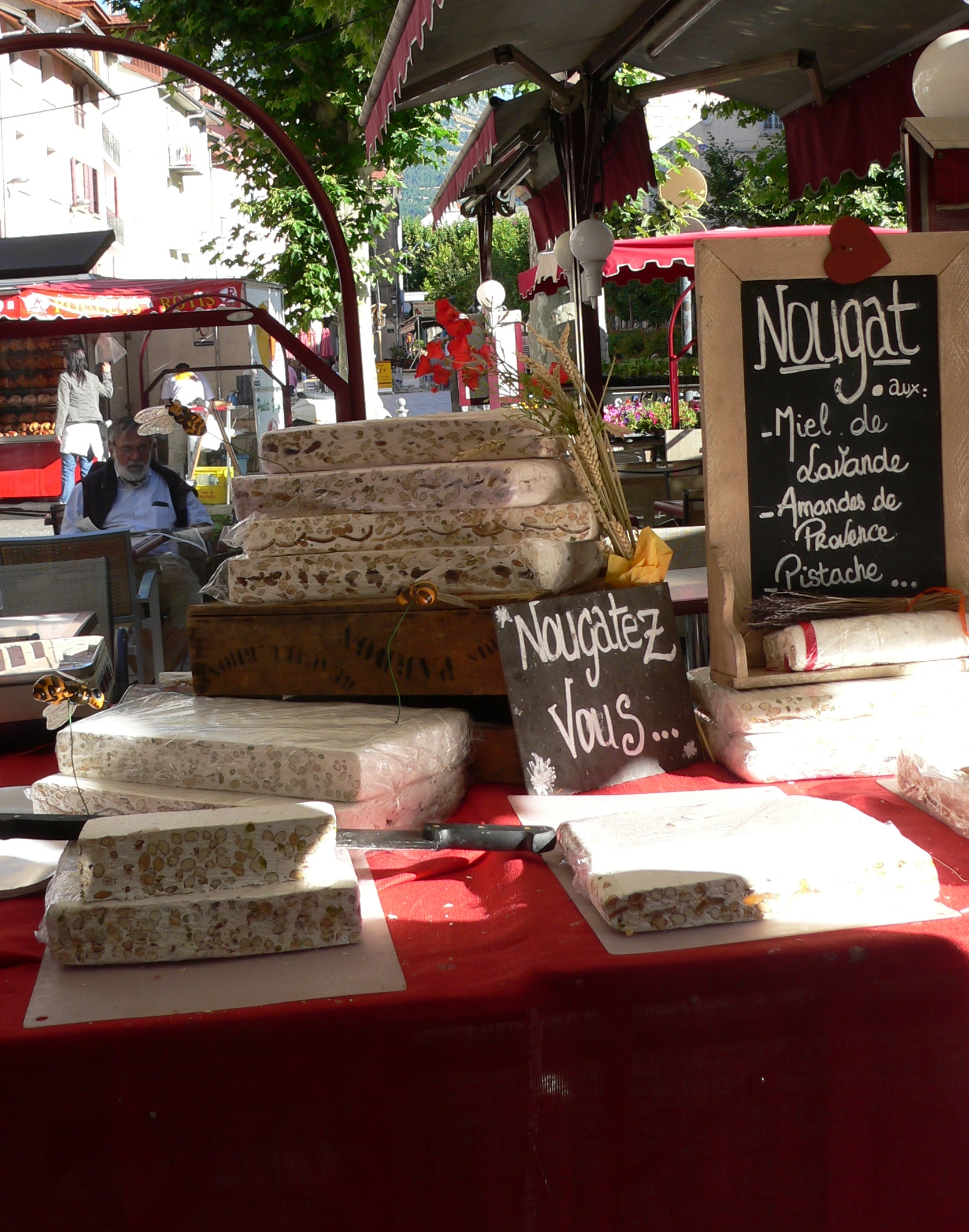 Nogat de Gap (Occitània). Nogat en un mercat.